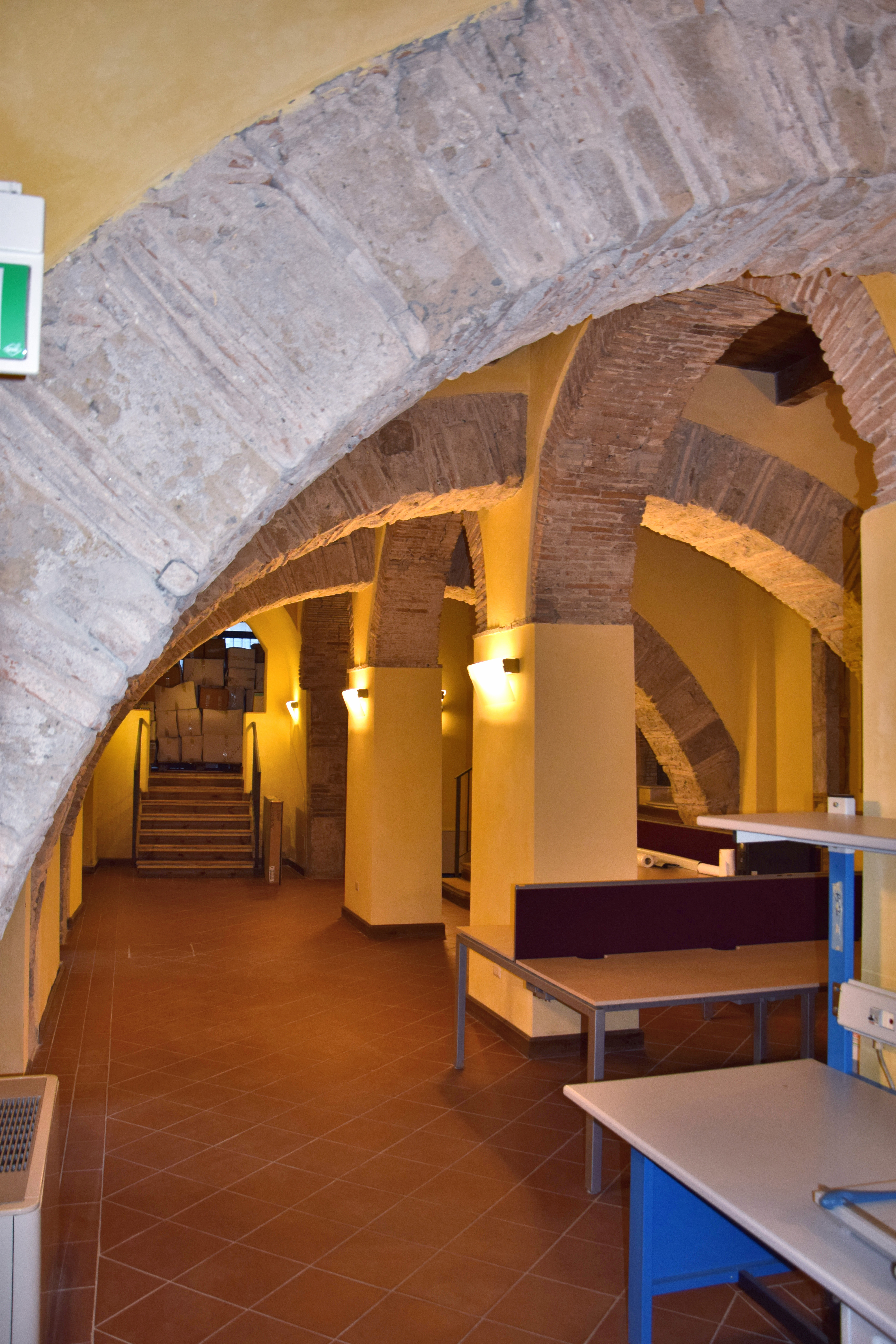 'ex monastero benedettino di San Vittorino a Benevento.